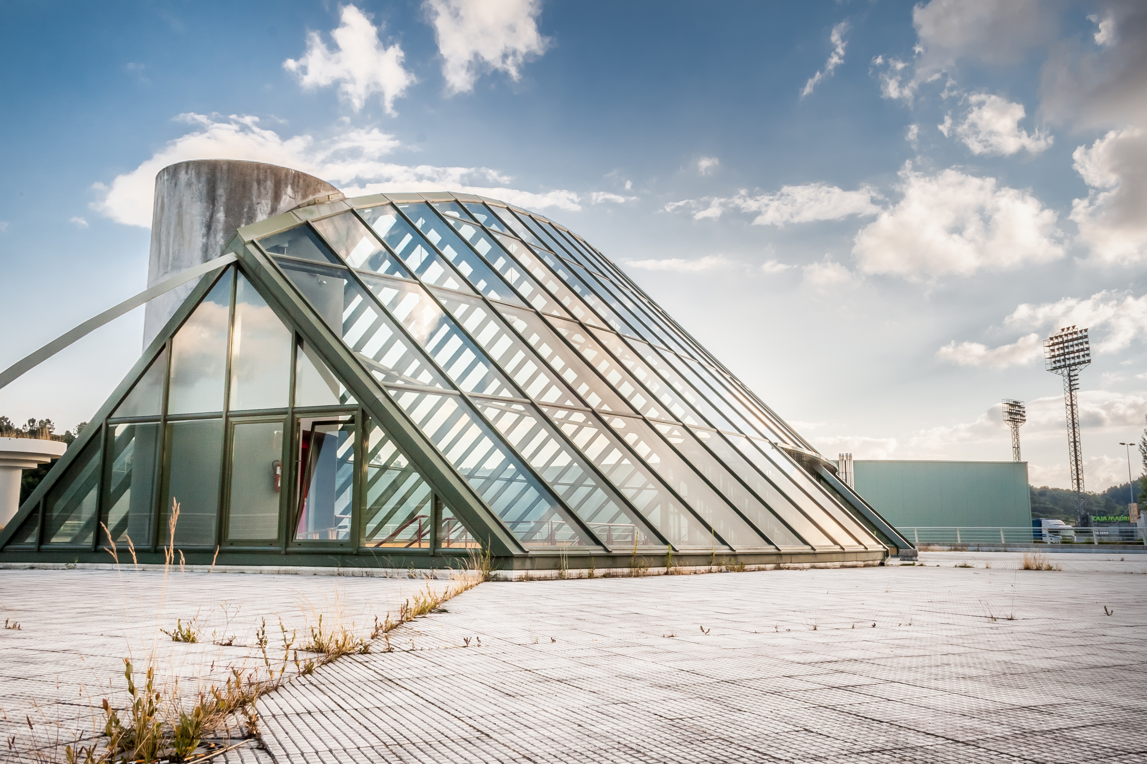 Entrada visitantes de el Pazo de Feiras e Congresos de Lugo.